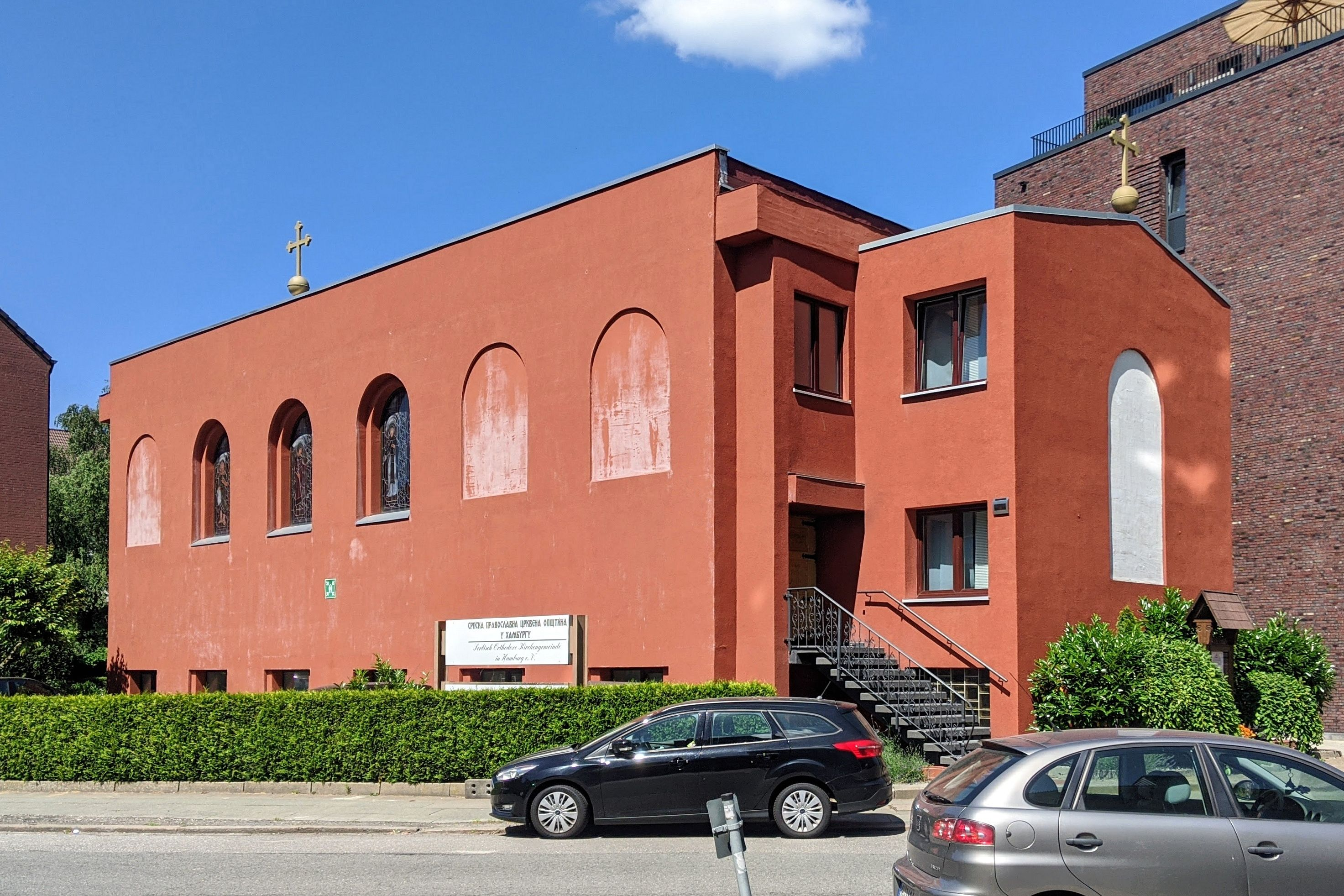 Serbisch-Orthodoxe Kirche im Hamburger Stadtteil Eilbek, Schellingstraße 9, Zustand 2020